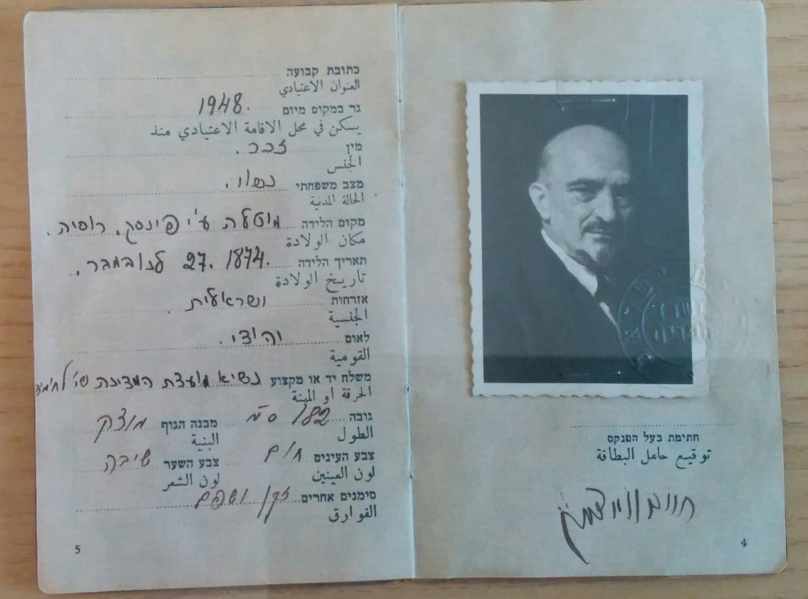 חיים ויצמן, תעודת זהות